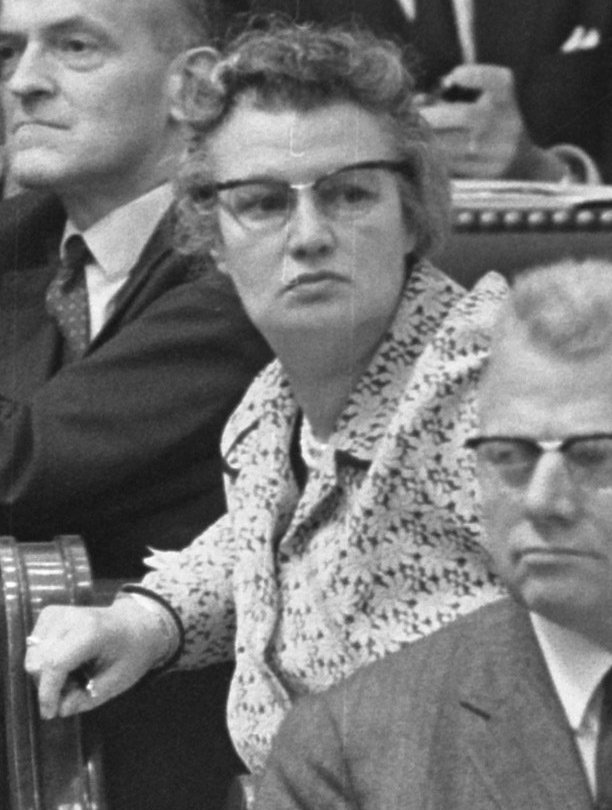 Collectie / Archief : Fotocollectie Anefo Reportage / Serie : Tweede Kamer tijdens de algemene beschouwingen 1966 Beschrijving : De KVP-fractie. Van achter naar voren, links: Norbert Schmelzer, Fons Baeten, Ben Engelbertink, Jan de Vreeze, Annie Kessel, Jacobus van de Noort; midden: Petrus Aalberse; rechts: Willem Droesen, Jan Maenen, Rinus Peijnenburg Datum : 13 oktober 1966 Locatie : Den Haag, Zuid-Holland Trefwoorden : parlementaire debatten, parlementariërs, politiek Persoonsnaam : Aalberse, Petrus, Baeten, Fons, Droesen, Willem, Engelbertink, Ben, Kessel, Annie, Maenen, Jan, Noort, Jacobus van de, Peijnenburg, M.W.J.M., Schmelzer, Norbert, Vreeze, Jan de Fotograaf : Ron Kroon / Anefo Auteursrechthebbende : Nationaal Archief Materiaalsoort : Negatief (zwart/wit) Nummer archiefinventaris : bekijk toegang 2.24.01.05 Bestanddeelnummer : 919-6768